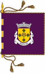 Bandeira da Freguesia de Avelal, Portugal.